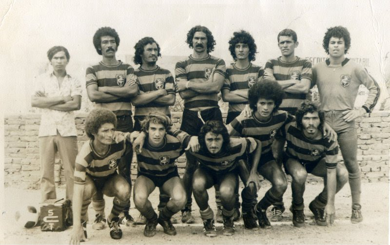 Um ano de refundação, já com o uniforme rubro-negro.